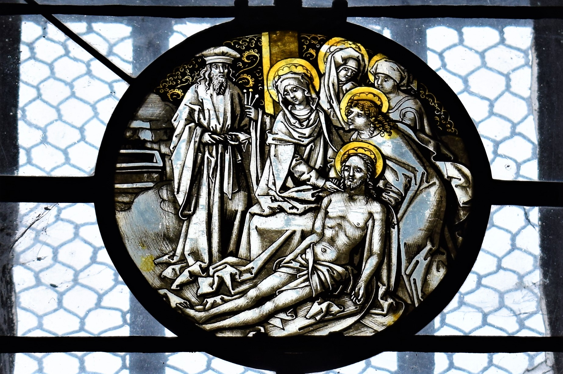 Rieterkirche Kalbensteinberg, Sakristei, Südfenster: Rundscheibe mit der Beweinung Christi, auch als Grablegung Christi bezeichnet (um 1500)